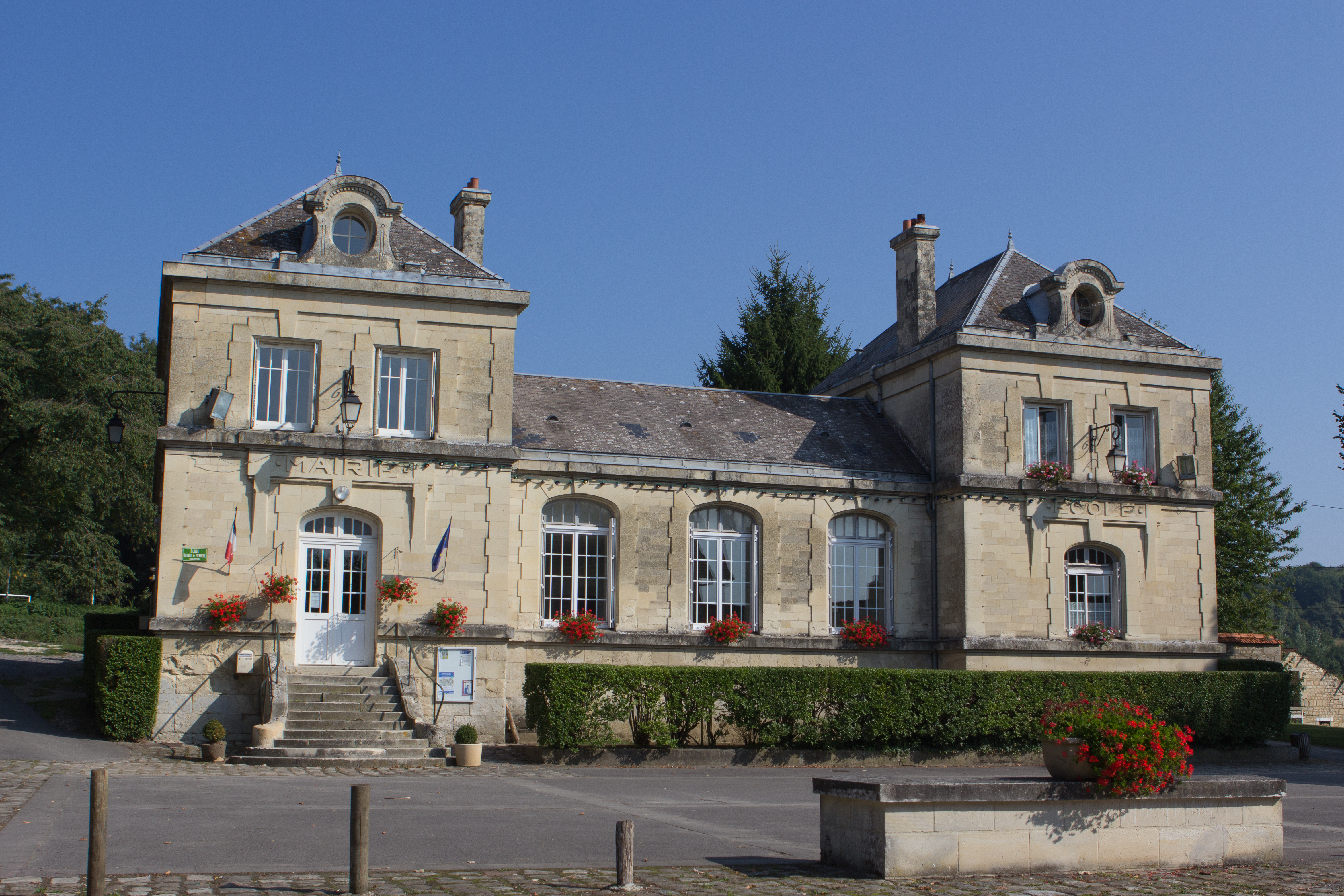 Mairie de Bouconville-Vauclair, Bouconville-Vauclair, Aisne, France